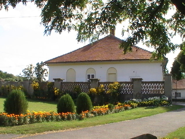 Bárczay-kastély, Pere (Borsod-Abaúj-Zemplén megye)